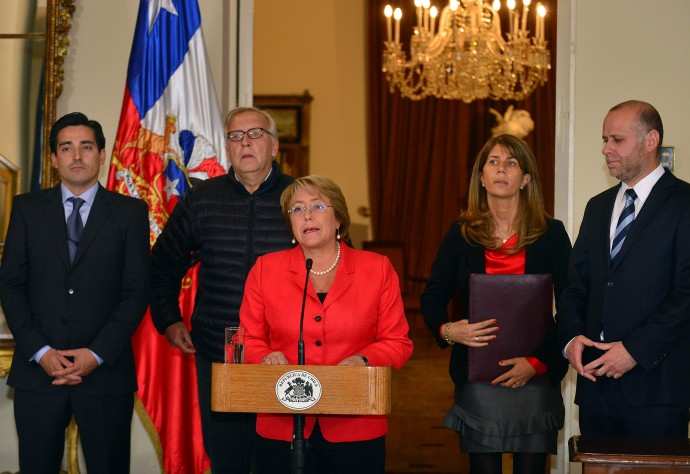 La Presidenta Michelle Bachelet (al centro) decreta estado de excepción constitucional de catástrofe para las regiones de Arica y Parinacota, y de Tarapacá, la madrugada del 2 de abril de 2014 tras el terremoto ocurrido la noche anterior en la costa de la región de Tarapacá. De izquierda a derecha: Rodrigo Peñailillo Briceño, ministro del interior; Jorge Burgos, ministro de Defensa; la presidenta Bachelet; Ximena Rincón González, ministra secretaria general de la presidencia; y Álvaro Elizalde, ministro secretario general de gobierno. "Presidenta decreta Estado de Excepción Constitucional de Catástrofe para Arica y Parinacota y Tarapacá. La Mandataria indicó que esta medida busca "evitar situaciones de saqueo y de desorden, junto con colaborar con la autoridad de la zona en las labores de ayuda que ya han comenzado", tras el terremoto de 8.3 grados en la escala de Richter que se registró a las 20:46 hrs. de ayer en el norte de Chile."